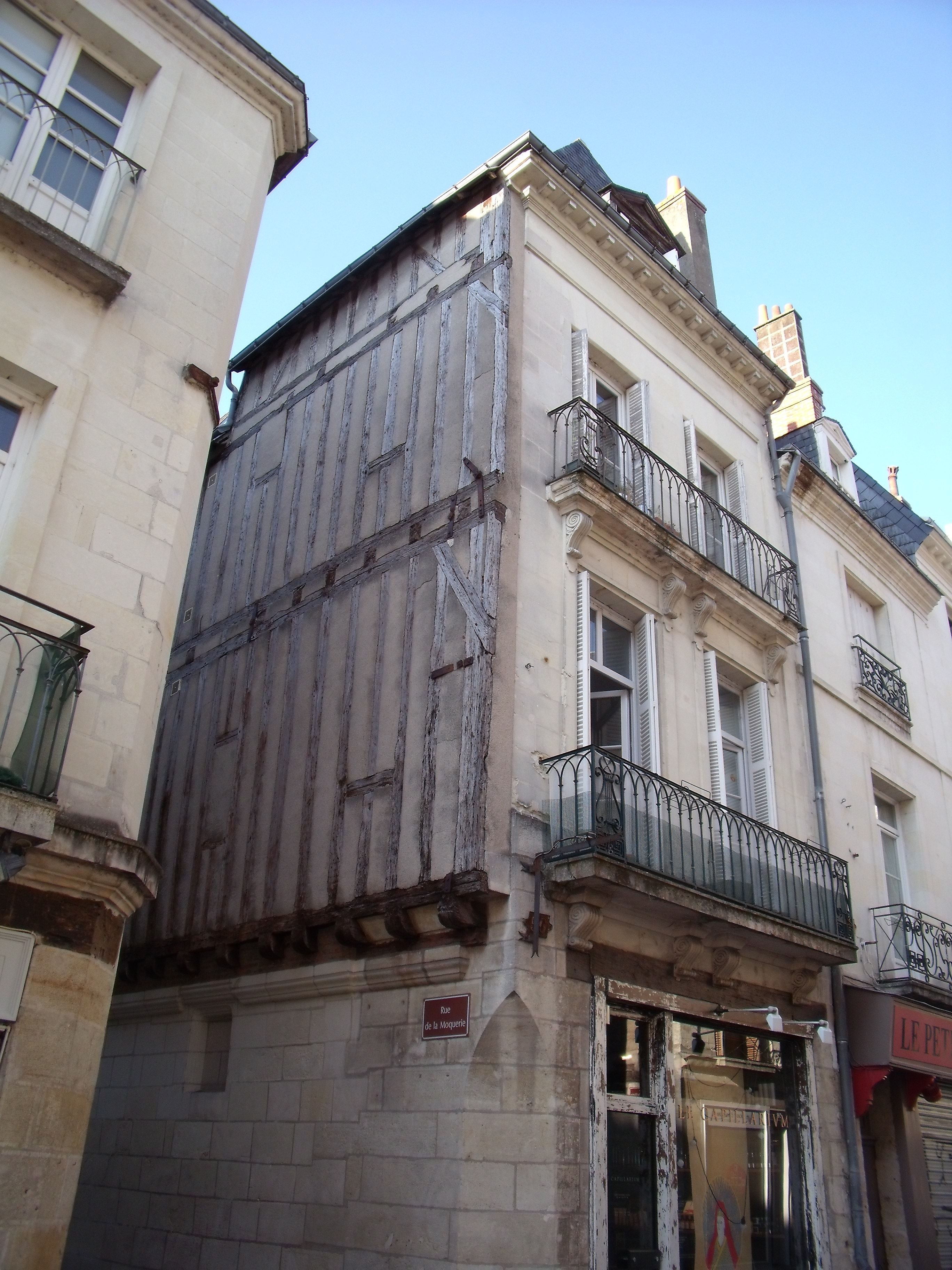 rue Colbert, maison XVe avec façade sur rue reconstruite au XIXe siècle